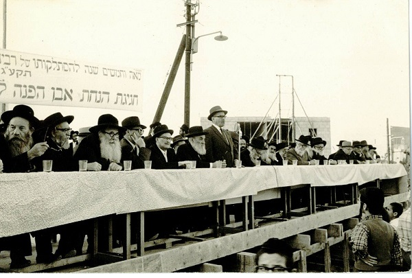 הנחת אבן הפינה לישיבת תורת אמת